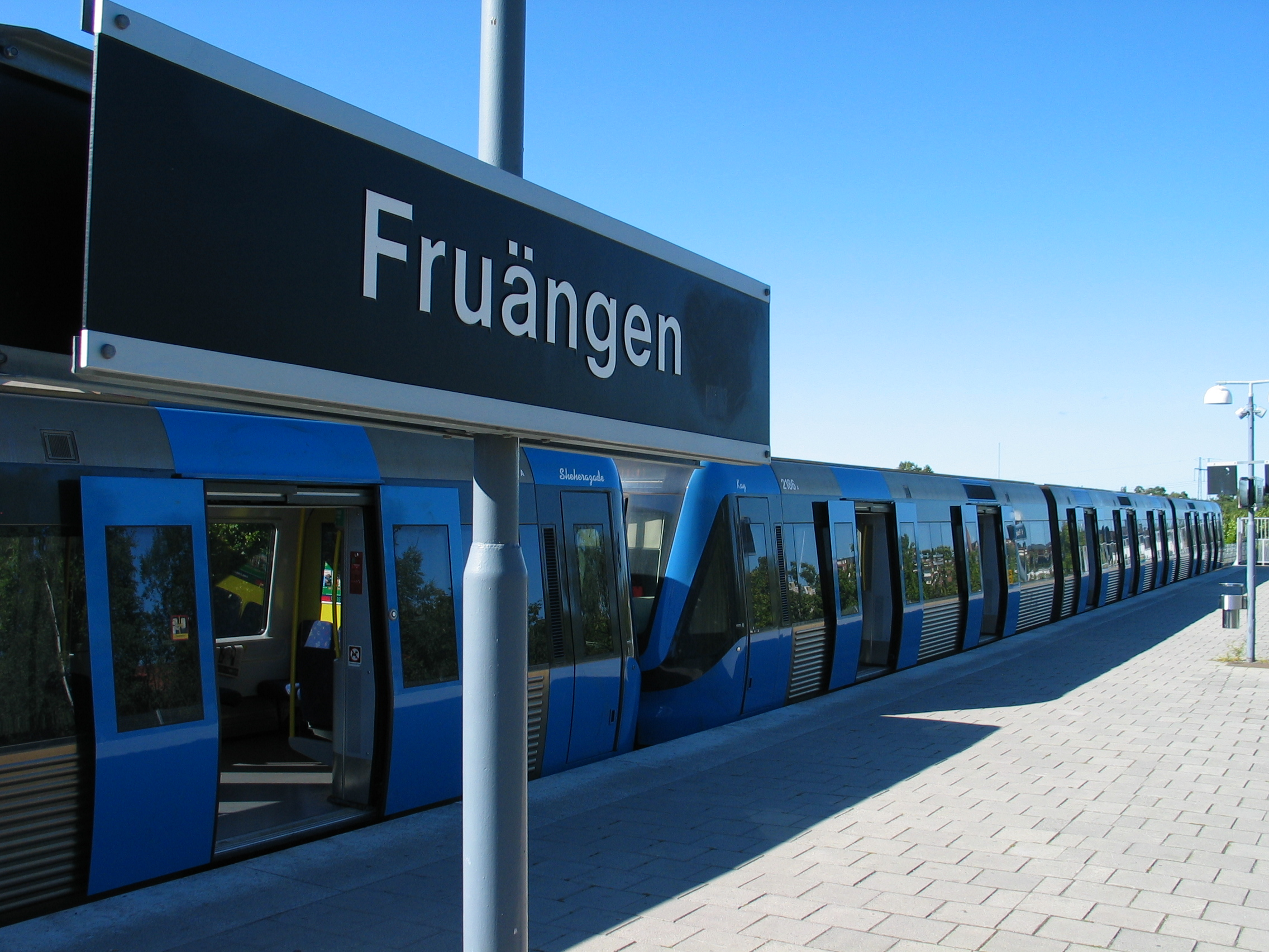 Fruängen, a metro station in Stockholm, Sweden.